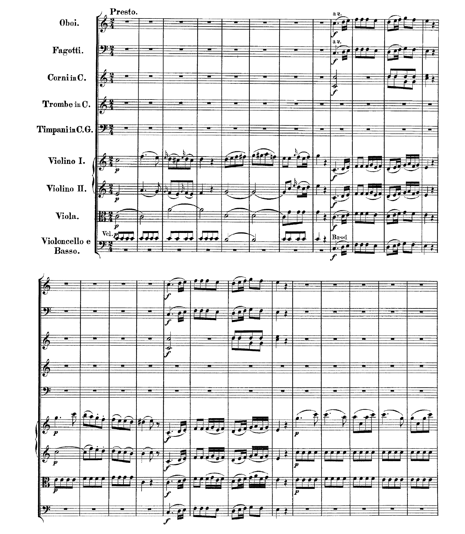 پارتیتور موومان چهارم از سمفونی لینز